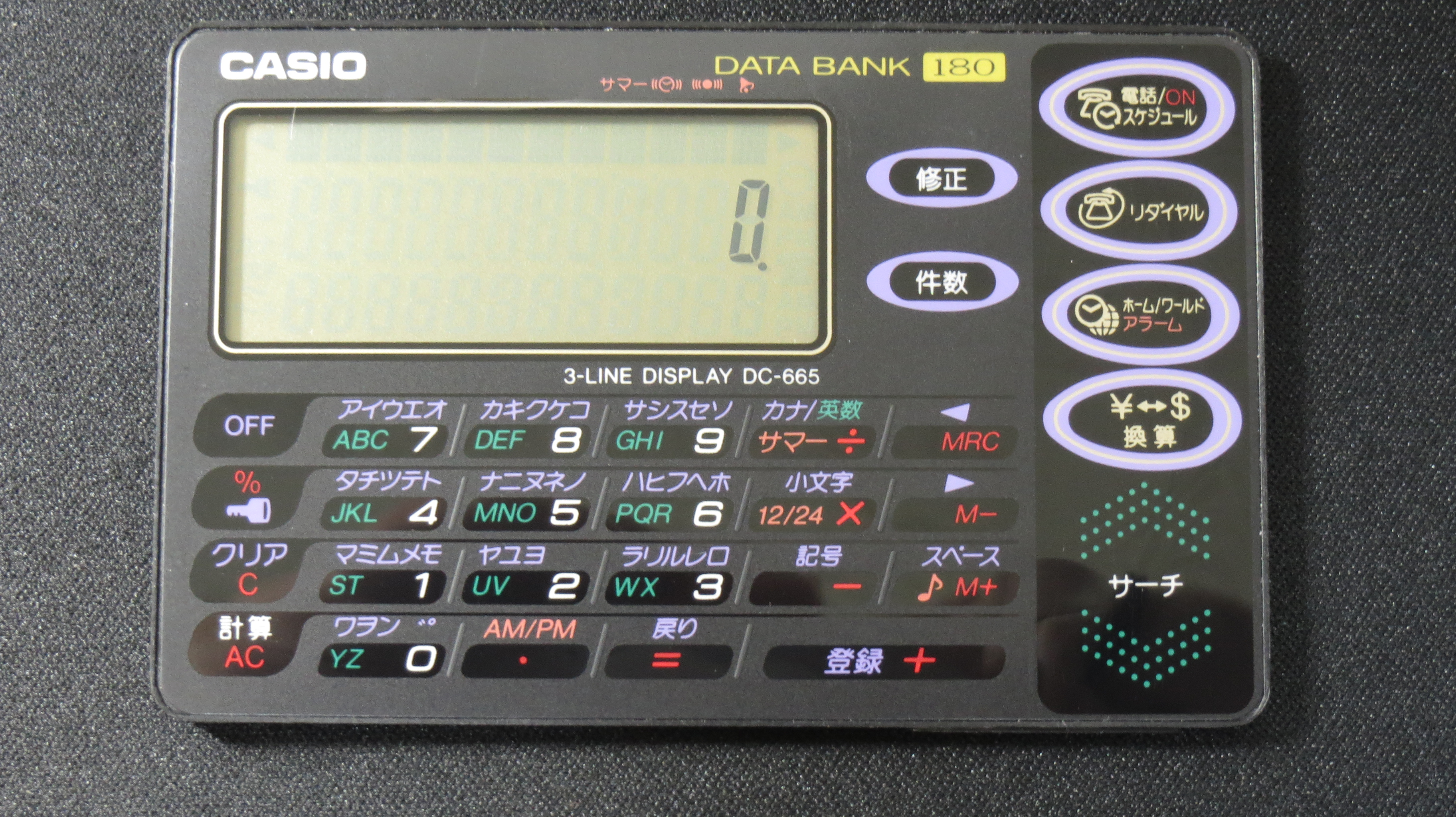 CASIOが販売していたカード型の電子手帳機能を持つ電卓。180件のデータを保存できる他、時計機能、スピーカー等を内蔵している。電子手帳機能を内蔵したカード型電卓としては末期の製品に当たる。